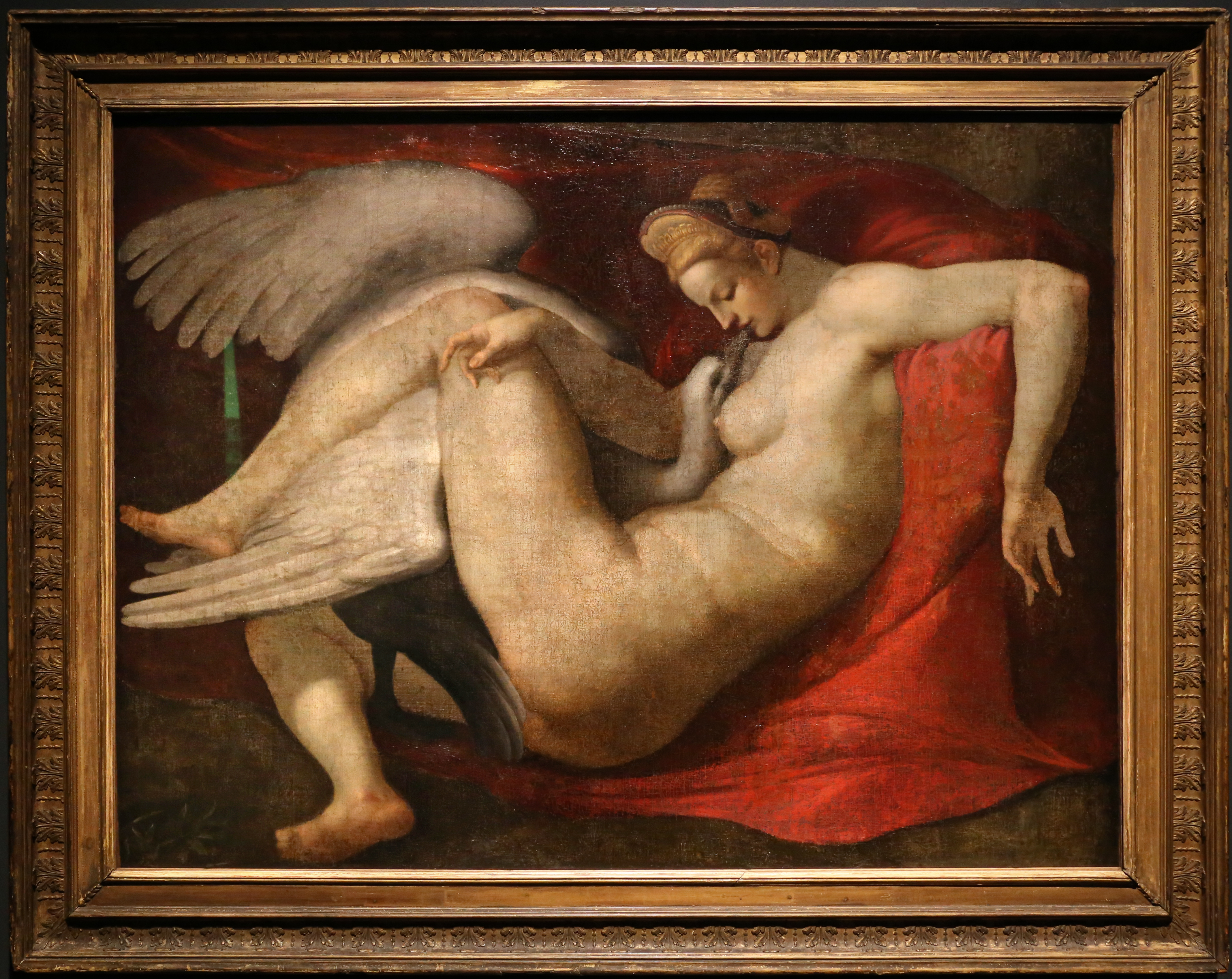 Palazzo dei Diamanti (Ferrara) This is a photo of a monument which is part of cultural heritage of Italy.